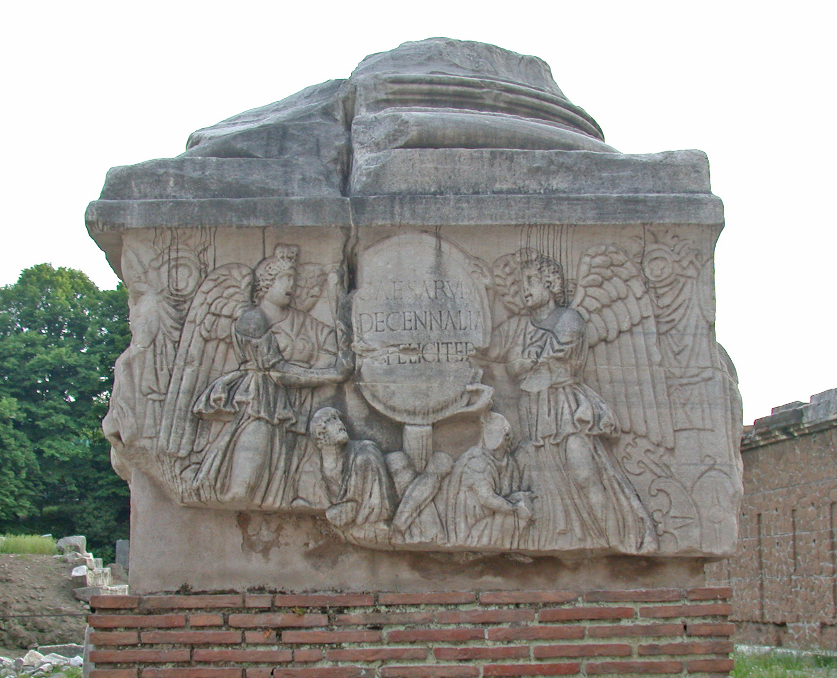 Fronte della base della colonna dei Decennalia nel Foro Romano a Roma: due vittorie alate recano uno scudo (clipeus) recante una iscrizione celebrativa dei decennalia (303) di Costanzo Cloro e Galerio: CAESARVM DECENNALIA FELICITER (CIL VI 1203, VI 31261). Foto personale (maggio 2005) by MM in it.wiki